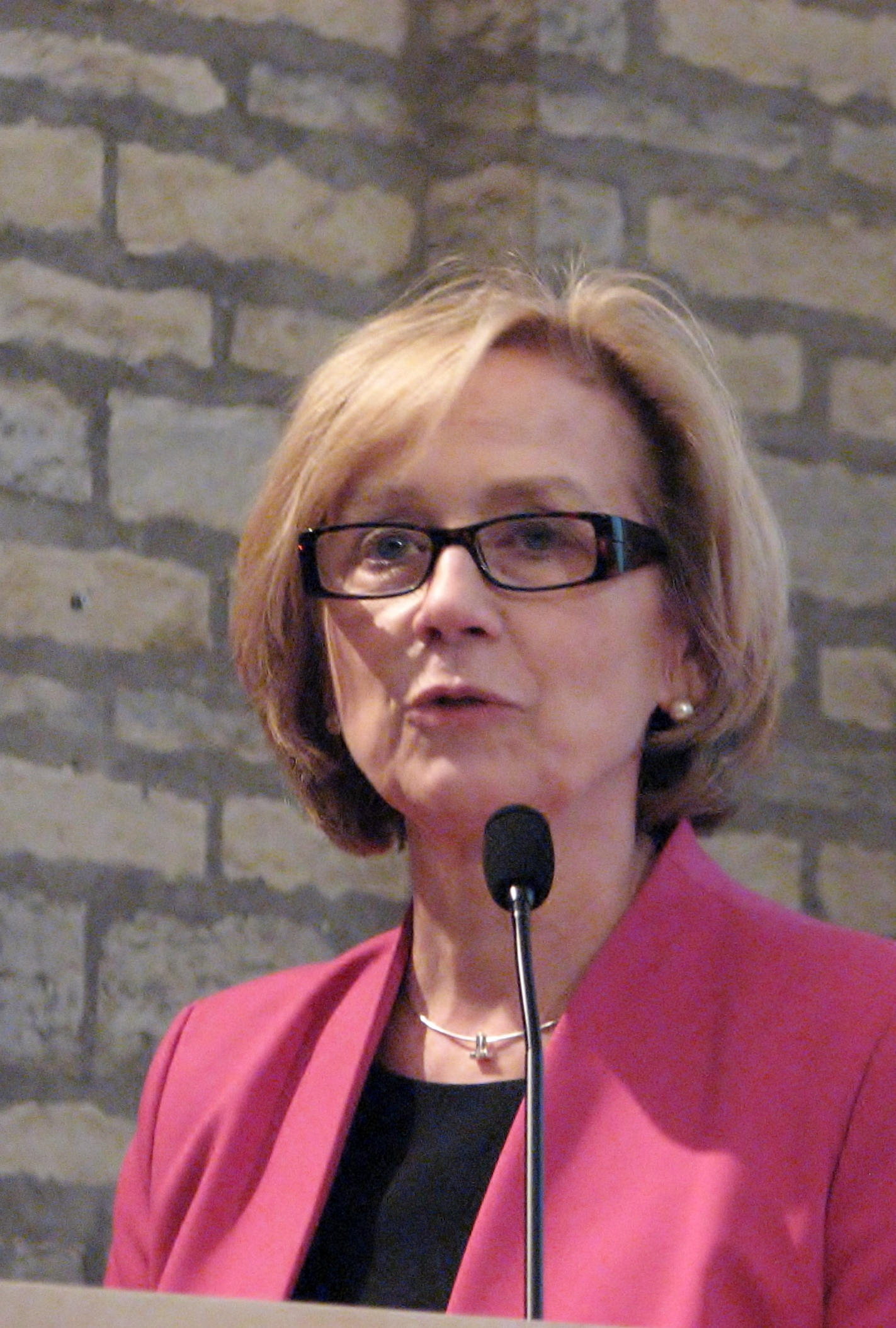 Urve Tiidus Eesti Raamatukoguhoidjate Ühingu koosolekul